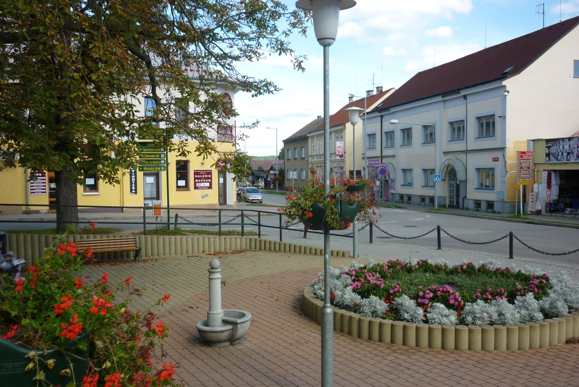 České Velenice, u křižovakty ulic Vitorazská, Revoluční a třídy Čsl. legií.